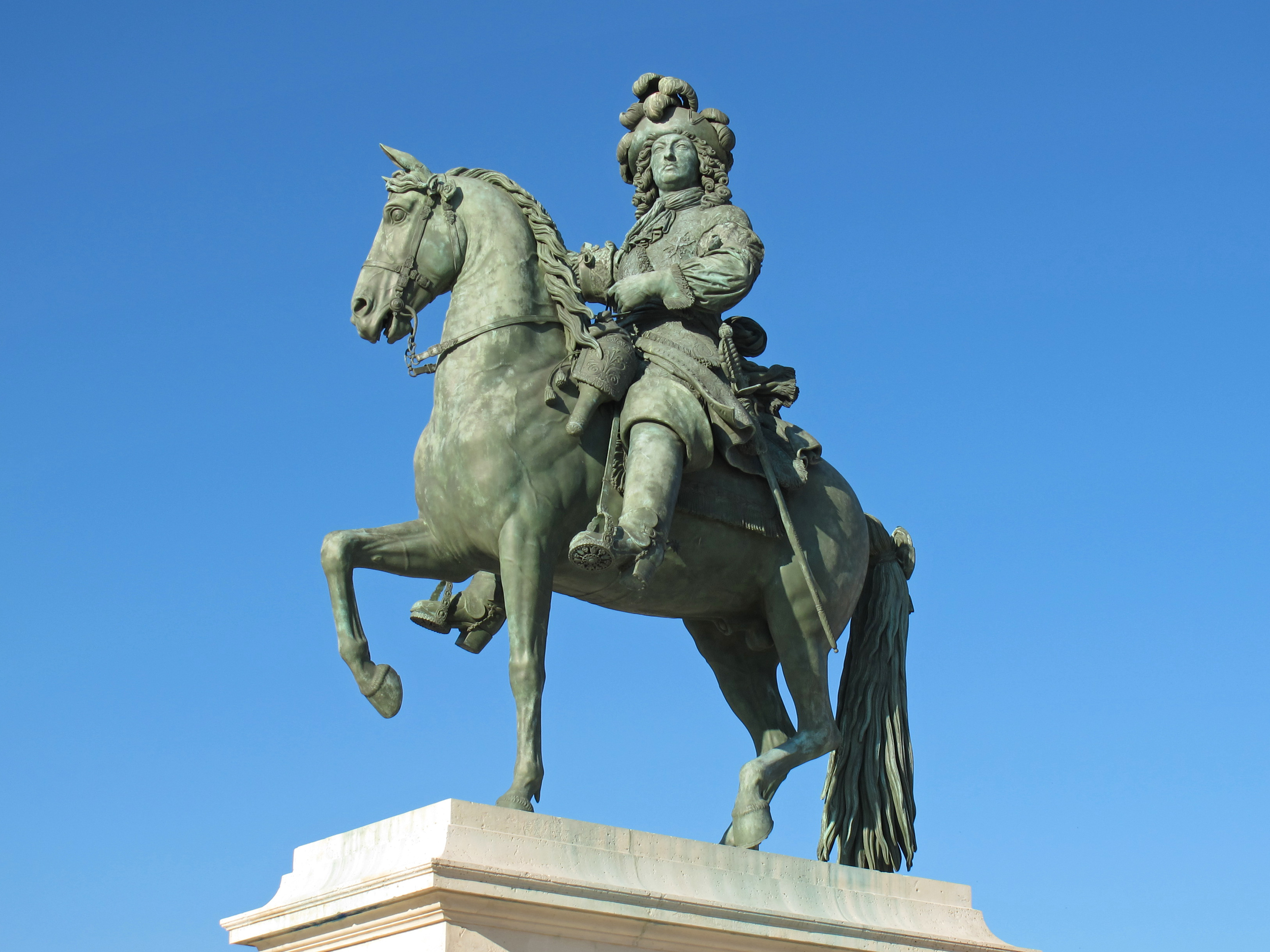 Statue équestre de Louis XIV.